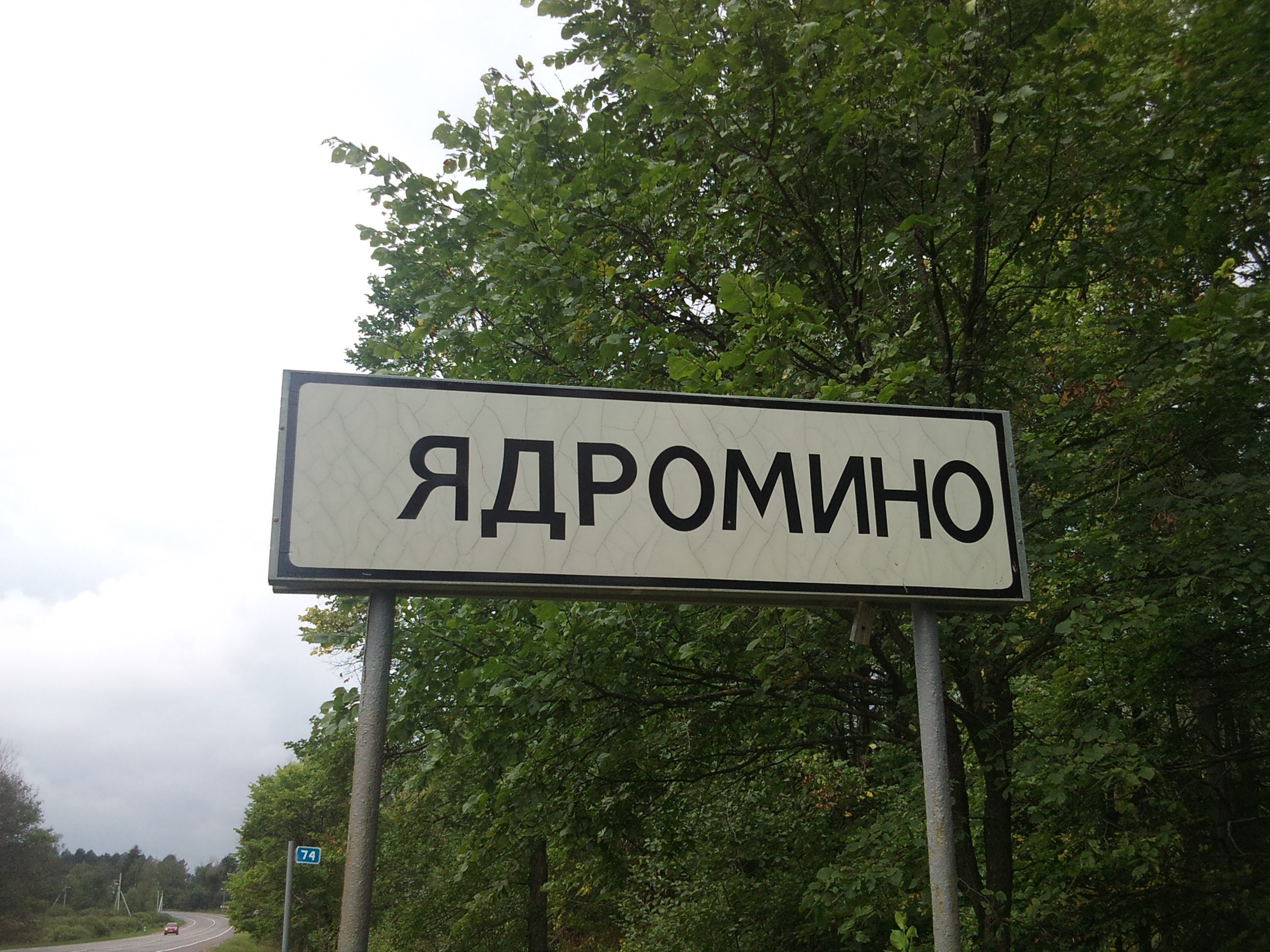 Знак начало населенного пункта на въезде в деревню Ядромино Истринского района Московской области при движении со стороны Москвы. Август 2012 года.